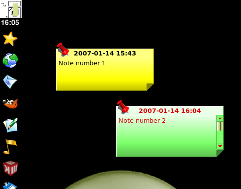 Illustration de Knotes